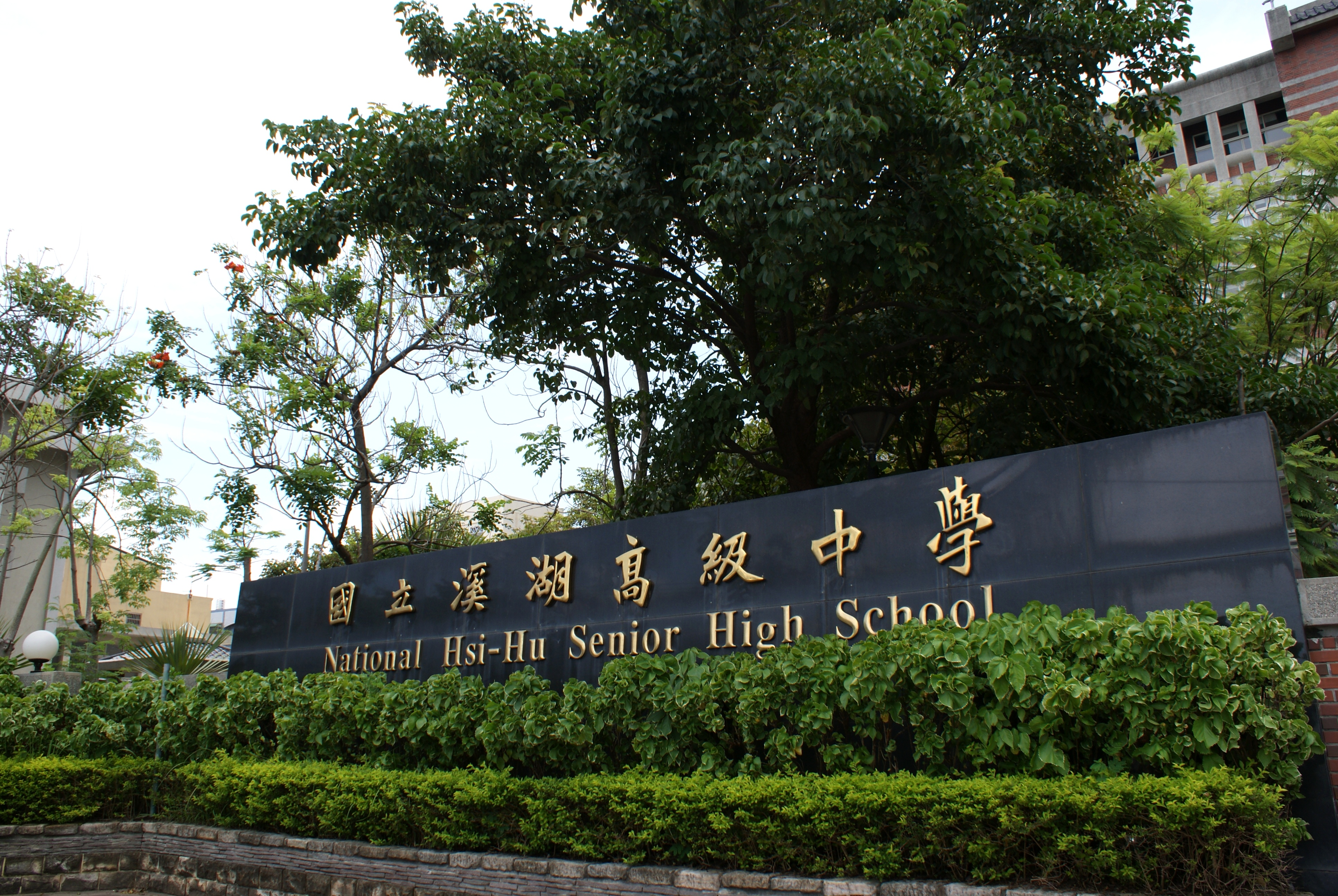 溪湖高中大門口的校名。Bân-lâm-gú: Khe-ôo Ko-tiong tuā-mn̂g-kháu ê hāu-miâ.